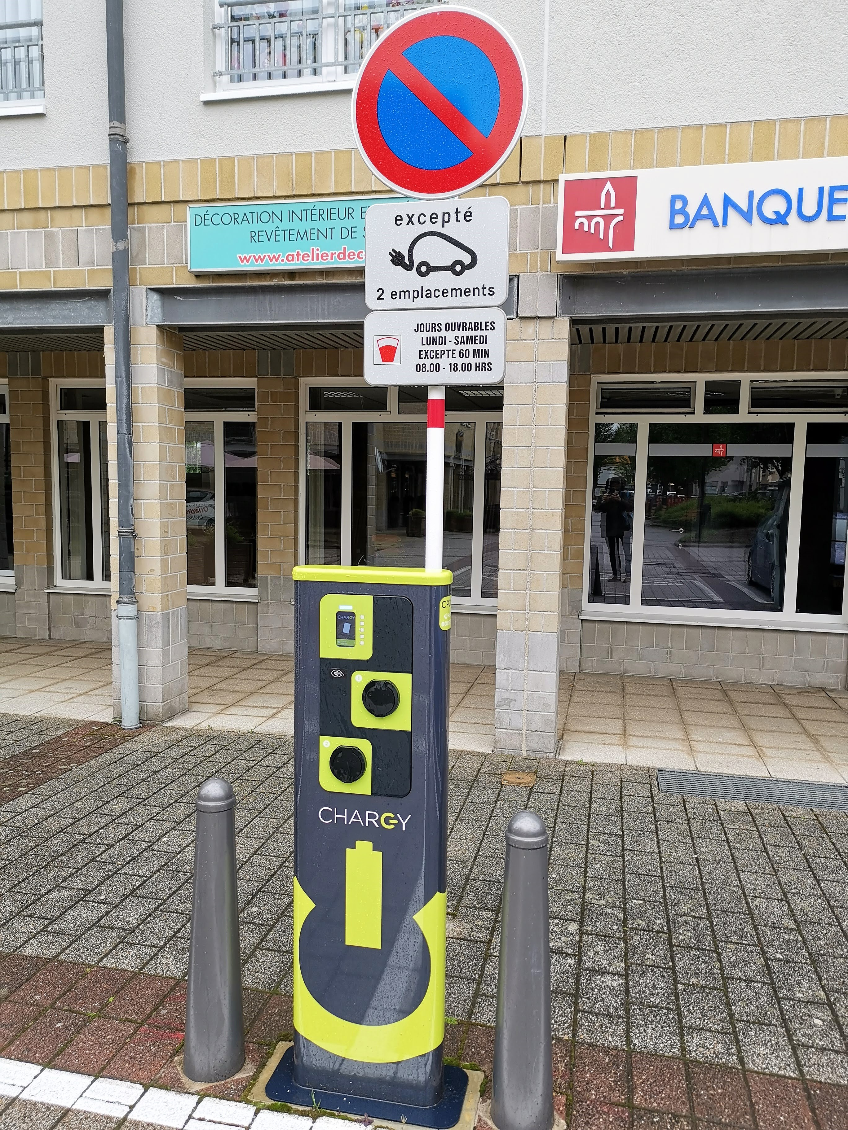 Luxembourg-Gasperich, places de stationnement réservées aux véhicules automoteurs électriques et électriques hybrides, raccordés au point de recharge.